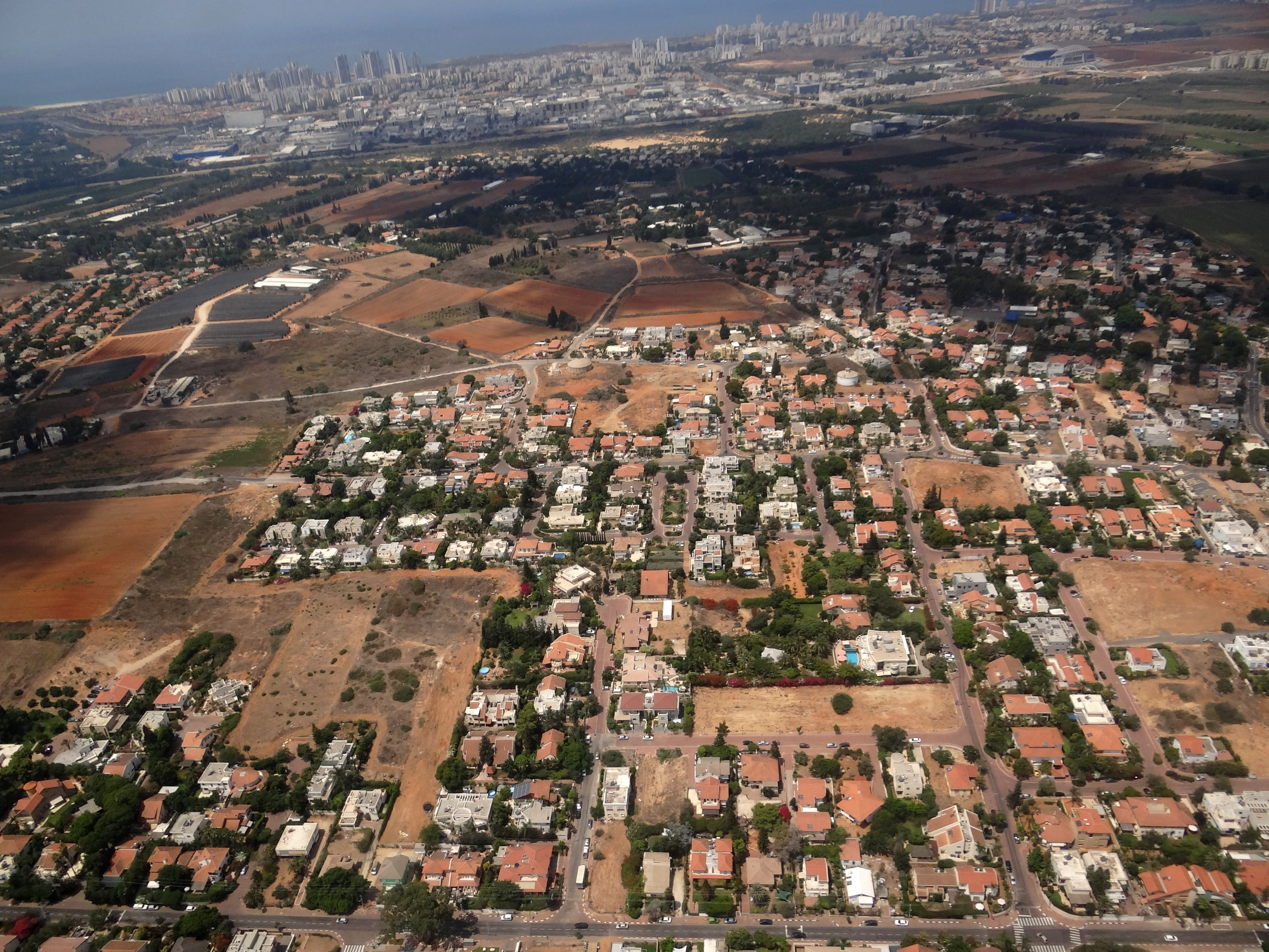 אבן יהודה בשרון